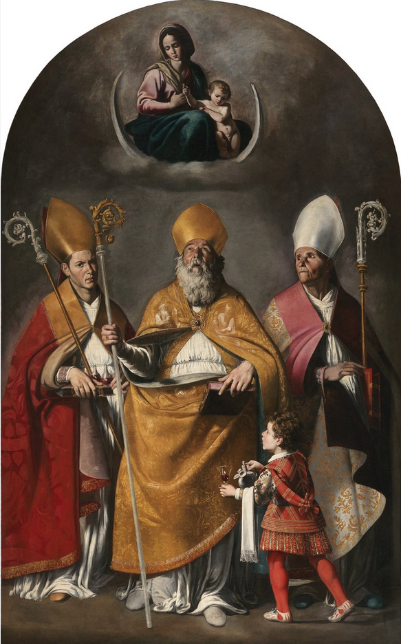 San Nicola di Bari tra san Severo e san Gennaro